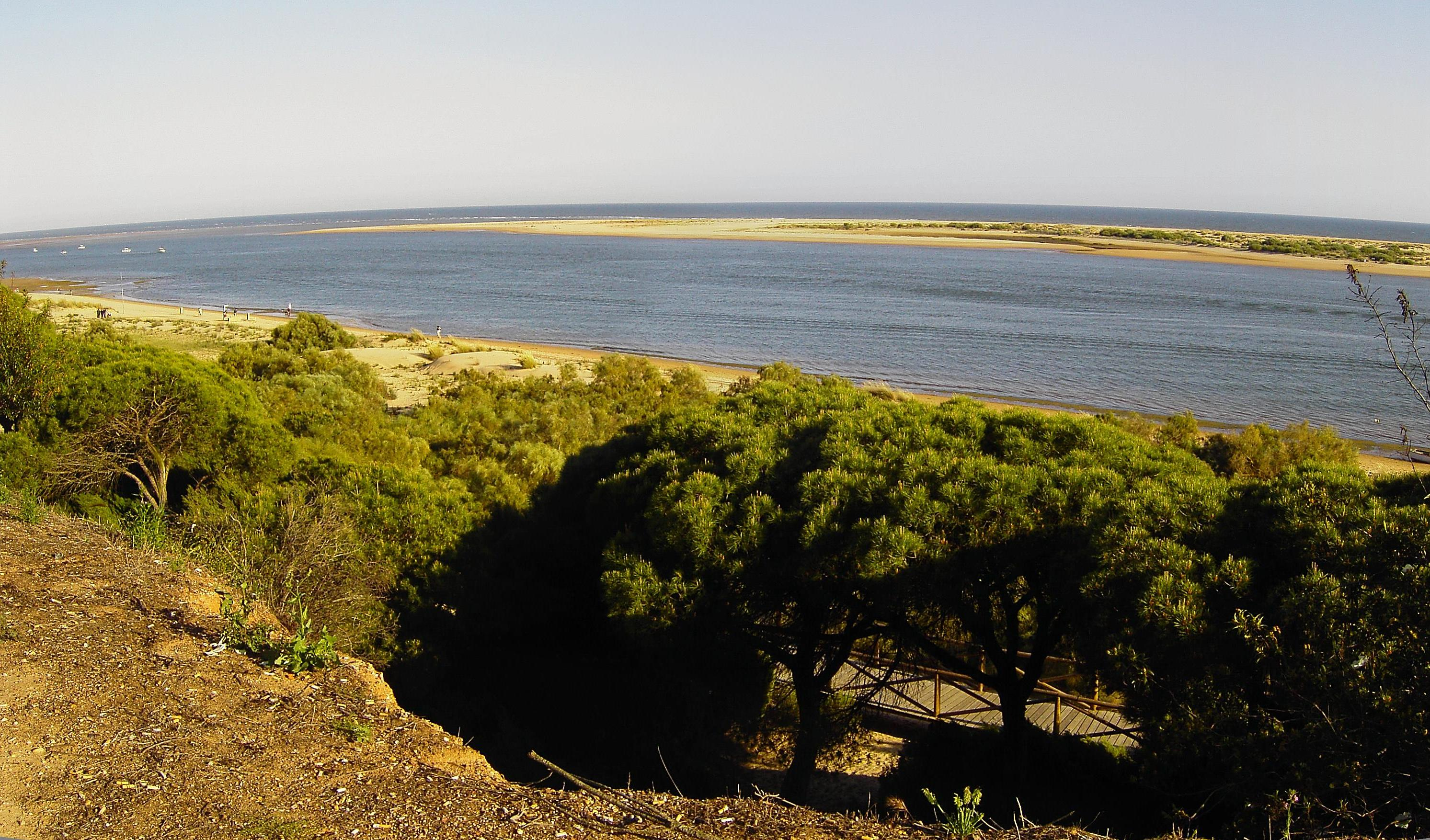 Paraje Natural de la Flecha de nueva umbria, Huelva (España)